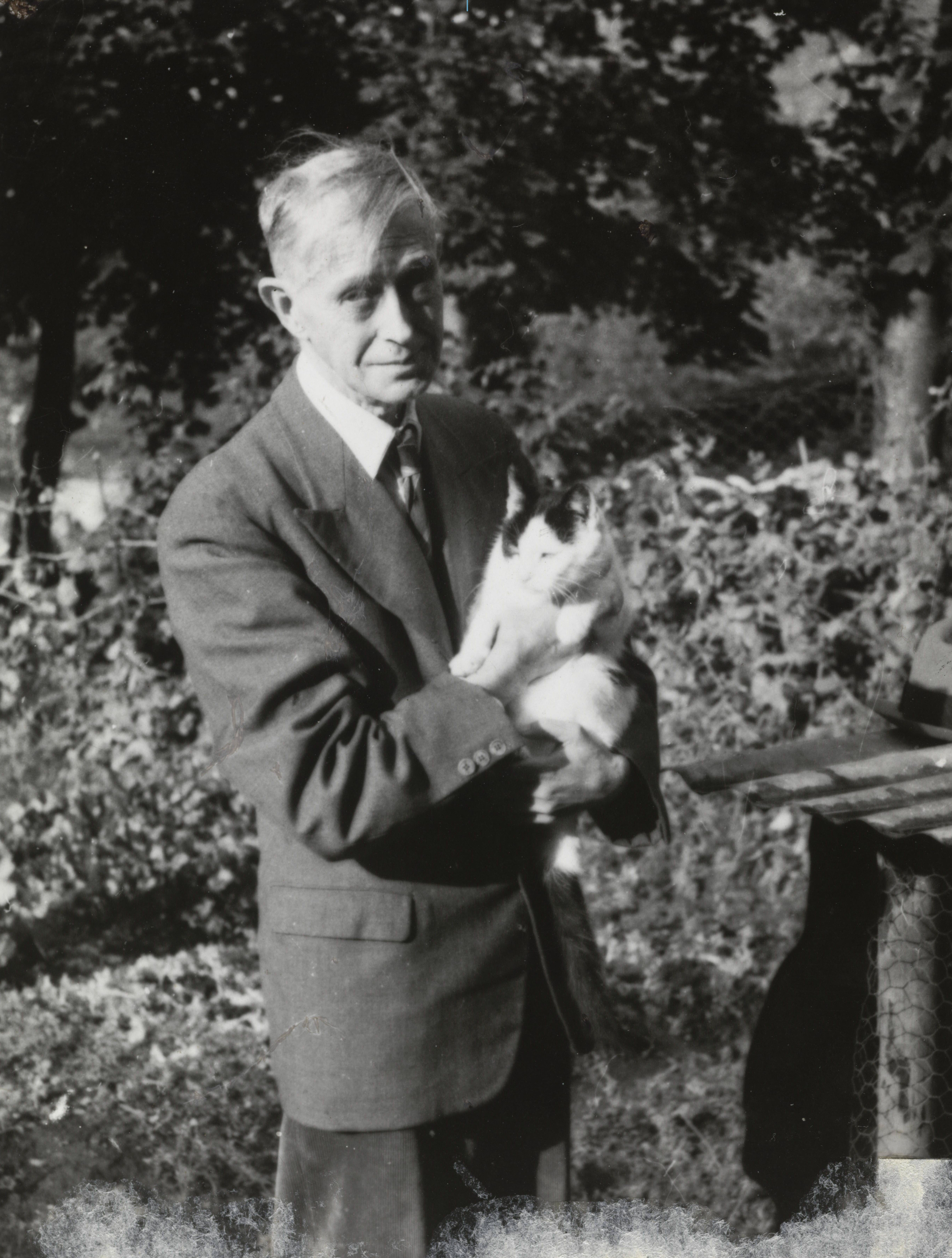 Bildet er hentet fra Nasjonalbibliotekets bildesamling